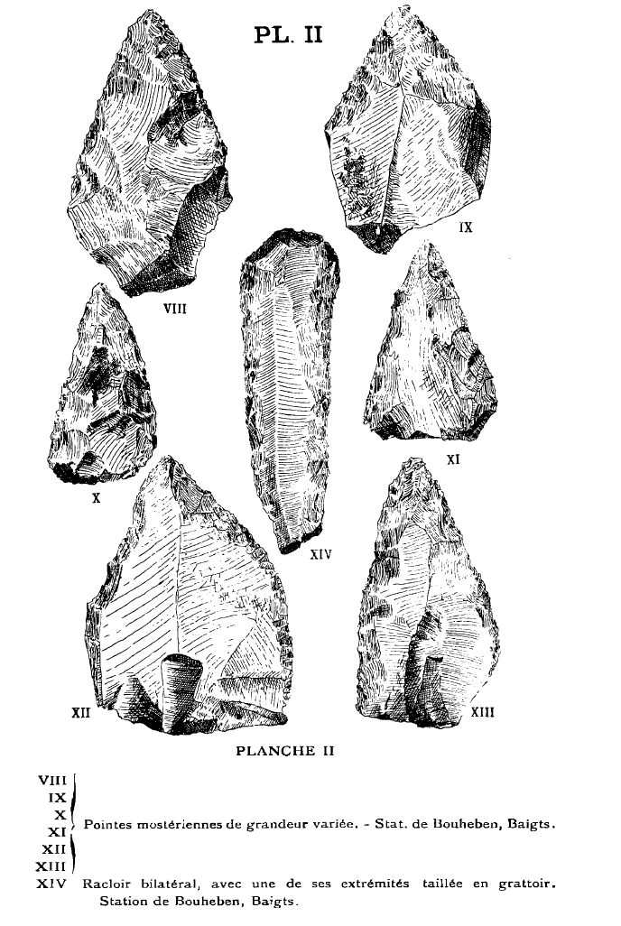 Planche Dessin de silex taillés trouvés à Baigts (Bouheben), Landes (40).